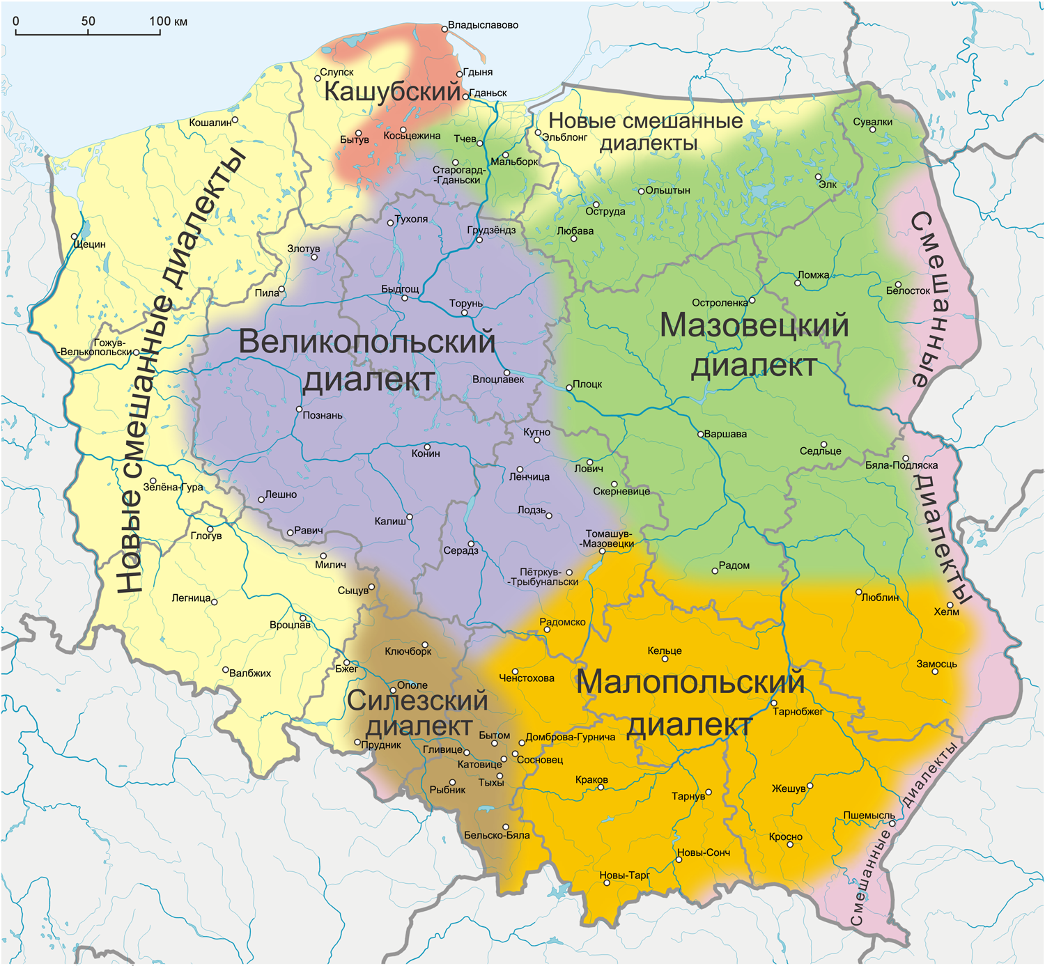 Карта распространения польских диалектов и кашубского языка К. Дейны